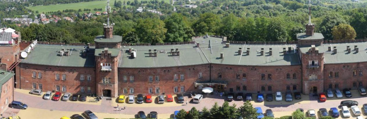 Siedziba radia RMF FM, al. Waszyngtona 1, 30-204 Kraków This photo was taken with Panasonic Lumix DMC-GH3 camera, thanks to Panasonic. You can see all photographs in category: Taken with Panasonic Lumix DMC-GH3.